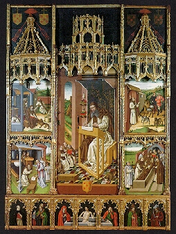 Retablo de San Jerónimo procedente del monasterio de La Mejorada (Olmedo, España). Pintura sobre tabla. Autor de la pintura Jorge Inglés. Se conserva en el Museo Nacional Colegio de San Gregorio.